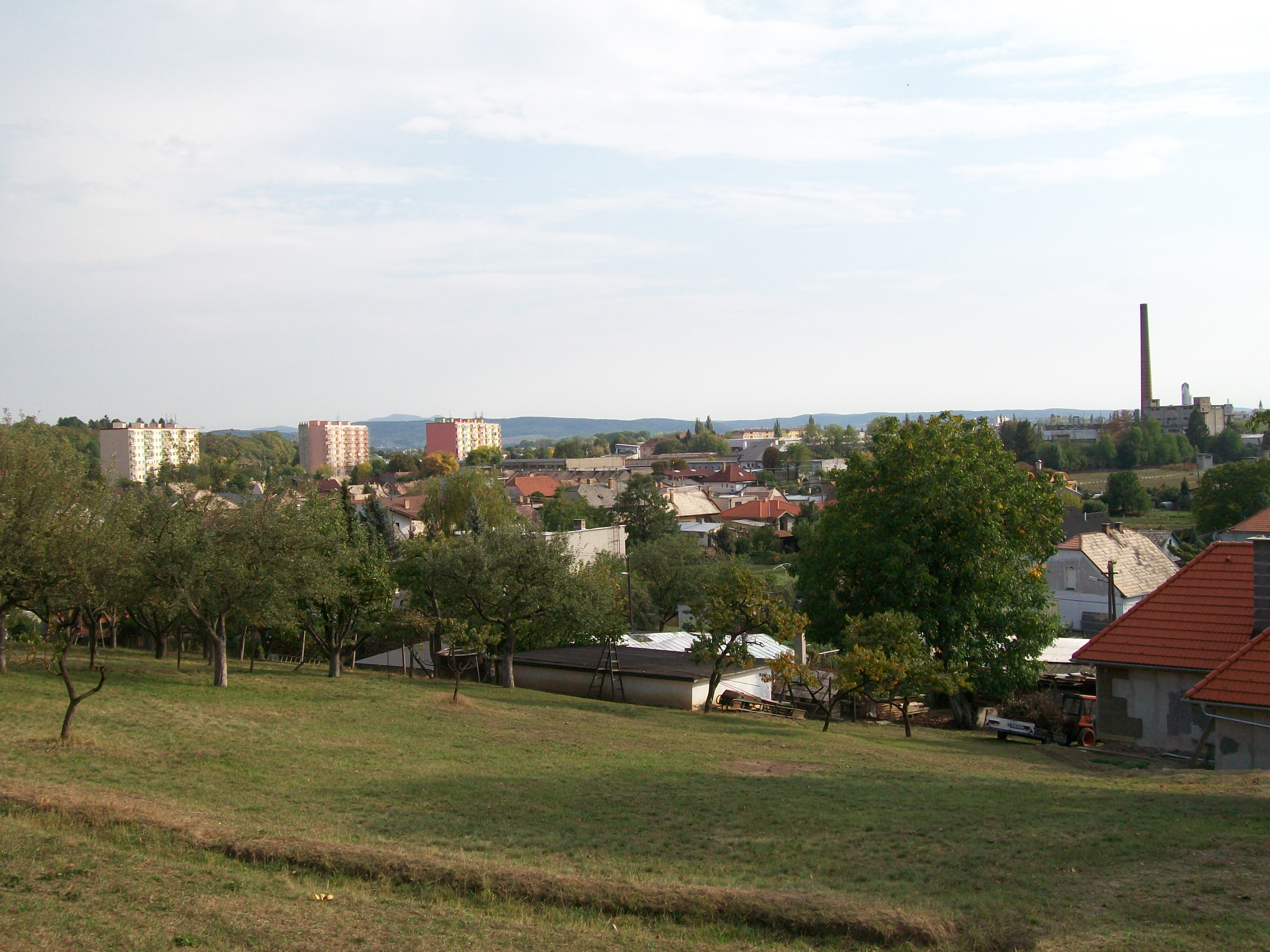 Pohľad na Opatovú (mestská časť Lučenca)